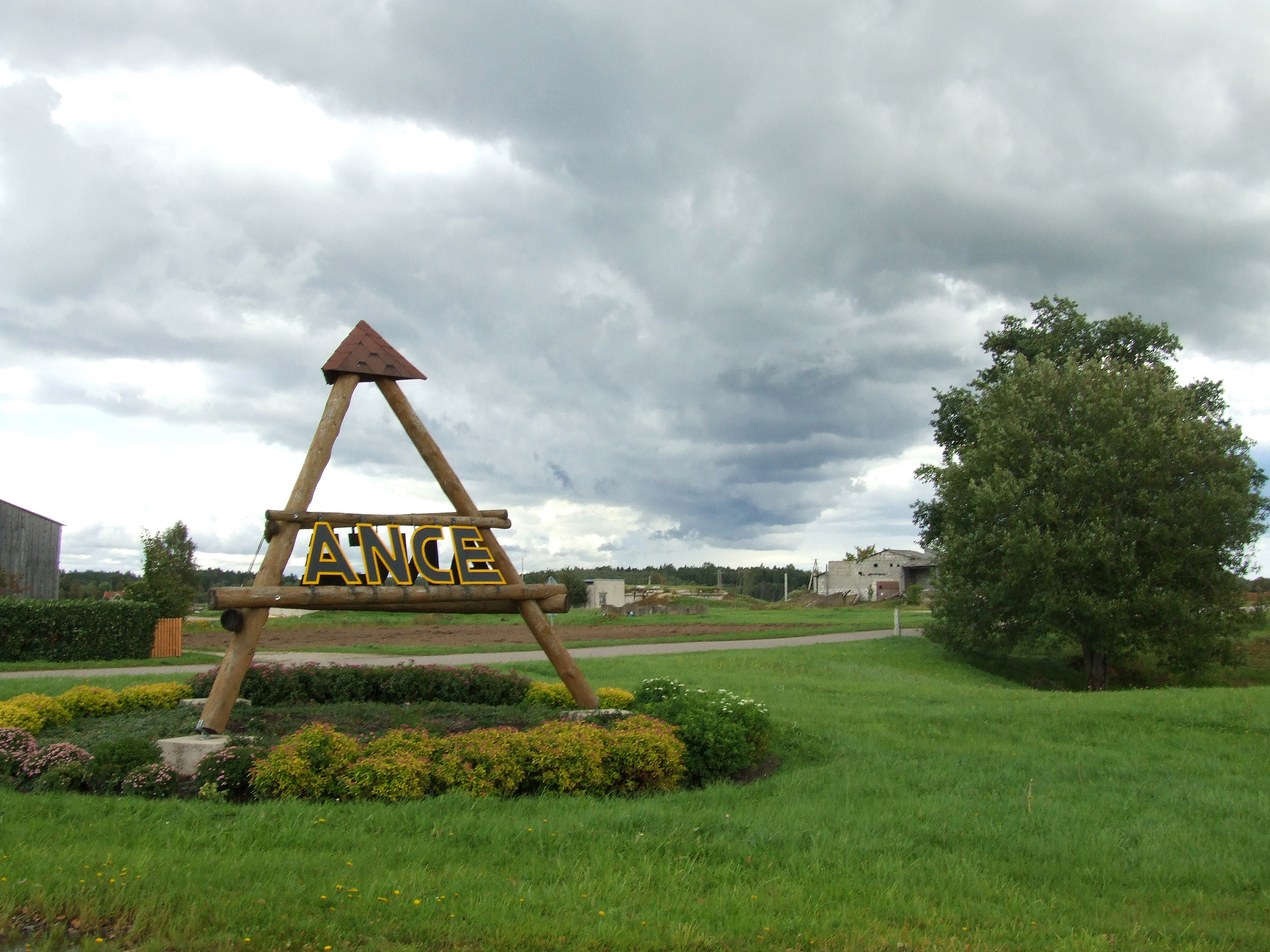 Ance